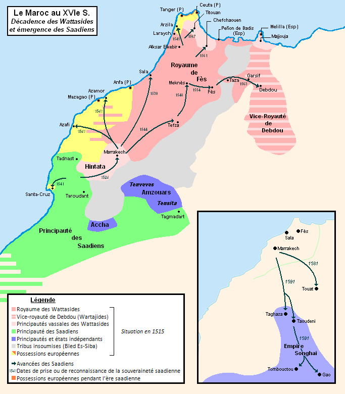 Carte de l'avancée des Saadiens au Maroc au XVIe S. (1509-1591)